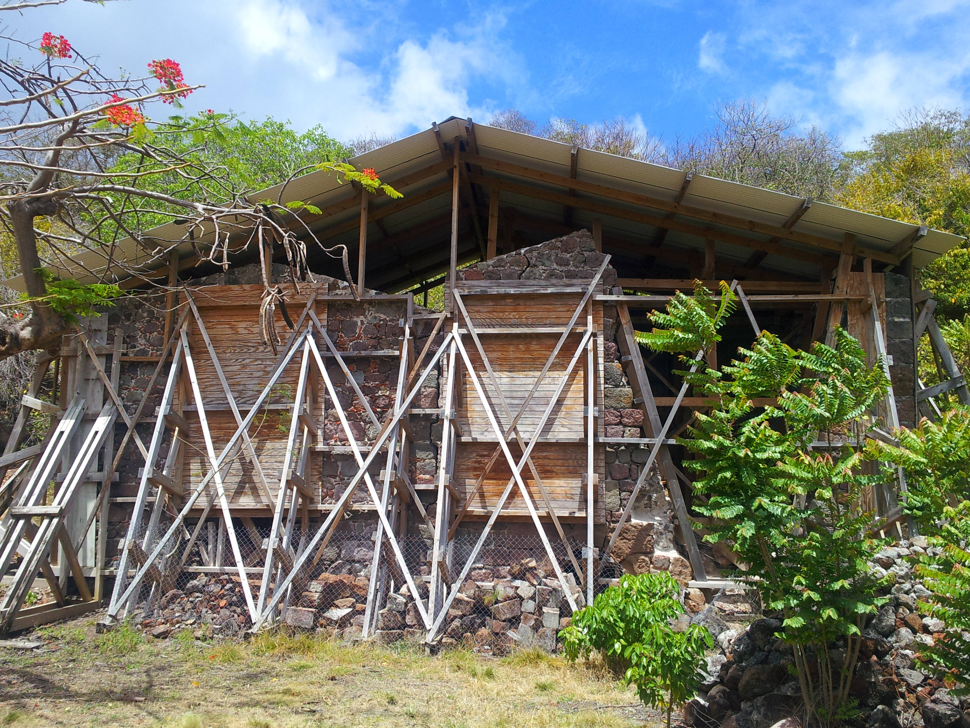 Poterie de Terre-de-Bas : les deux fours